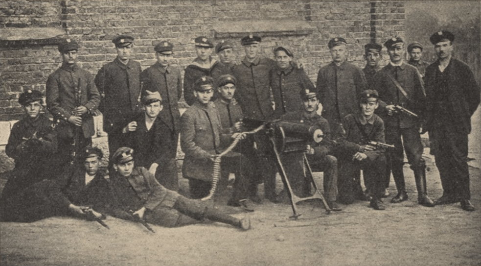 I powstanie śląskie, oddział karabinów masznowych w Bogucicach.